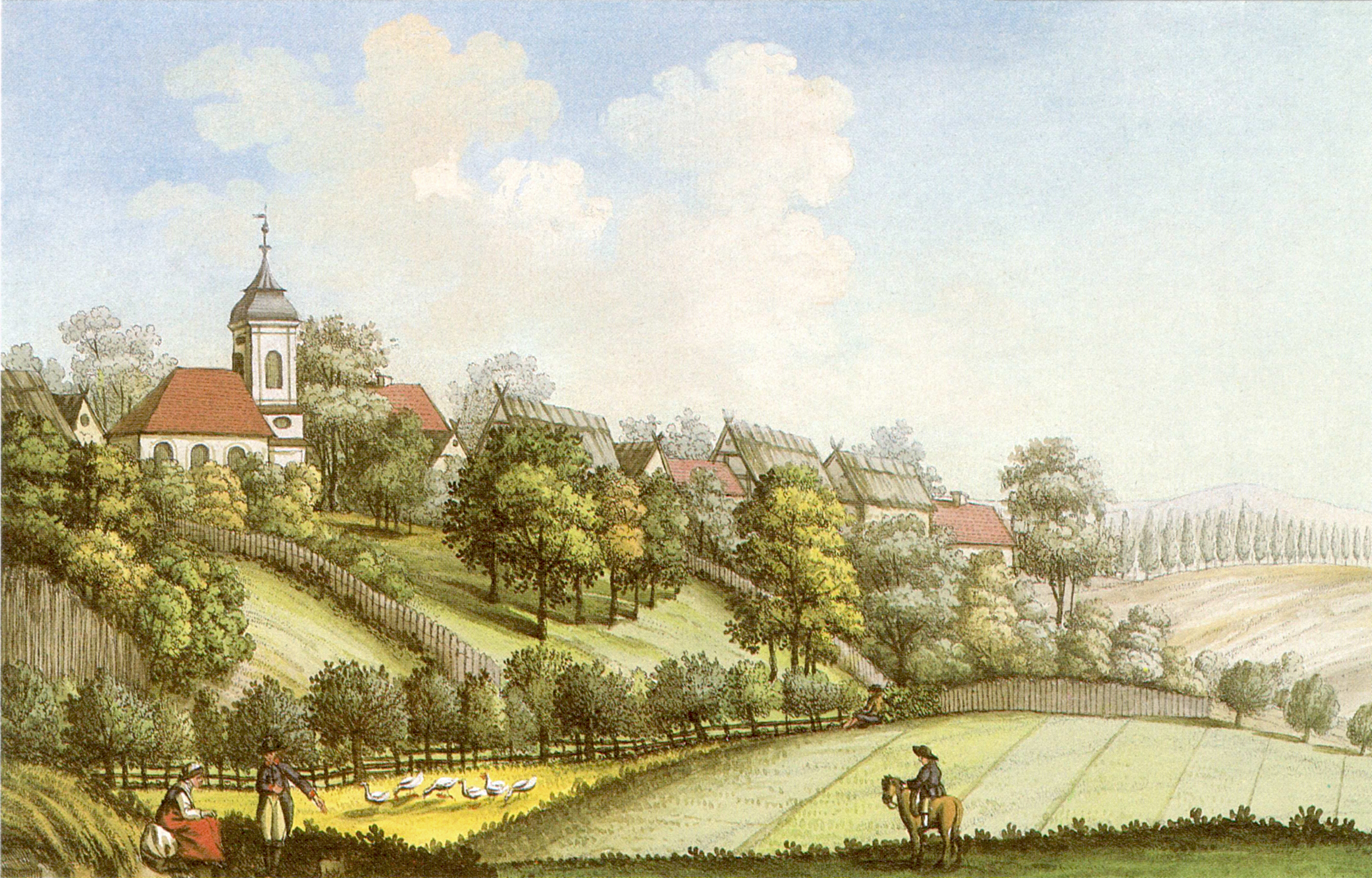 Das Dorf Schöneberg um 1800 in einem kolorierten Kupferstich von J.F. Hennig, Kupferstichkabinett Berlin